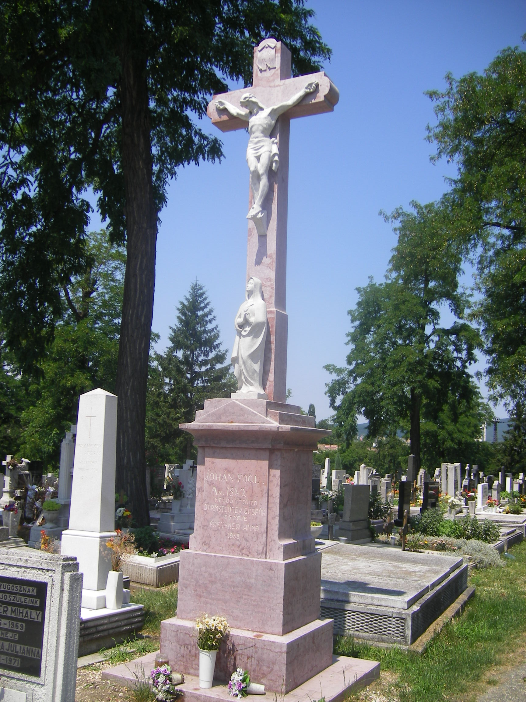 Felsőgalla - 1842-ben állított kereszt a temetőben